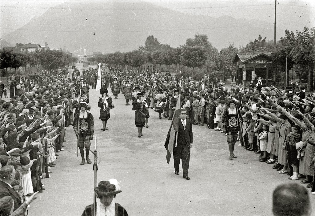 Título original: Procesión religiosa en el santuario de Loiola de Azpeitia (2/4) Localización: Azpeitia (Guipúzcoa)